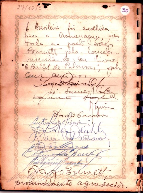 página do livro de ouro do Restaurante A Brasileira (São Luiz - Maranhão - 1957)